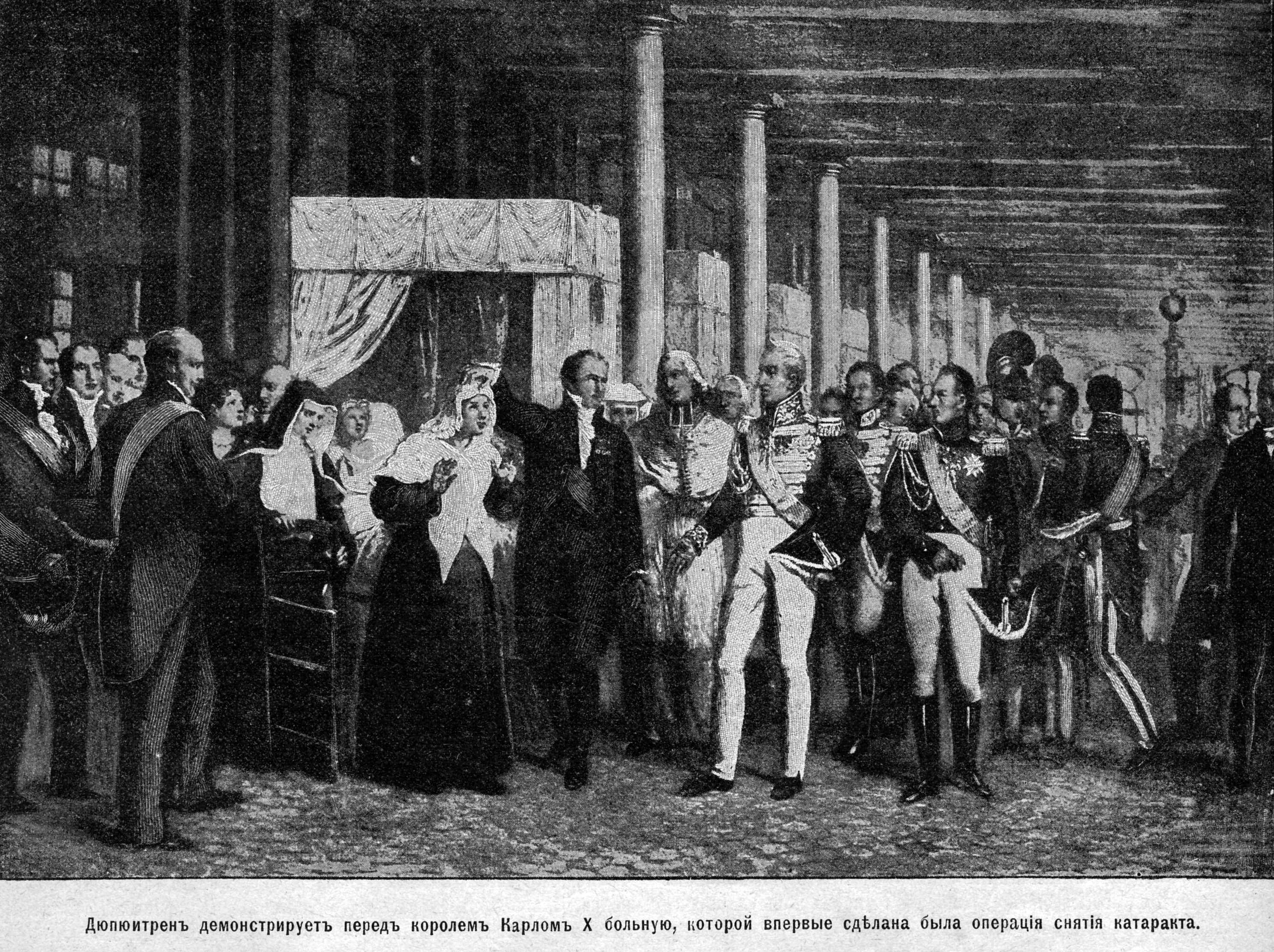 Дюпюитрен демонстрирует Карлу X результат операции по снятию катаракты.